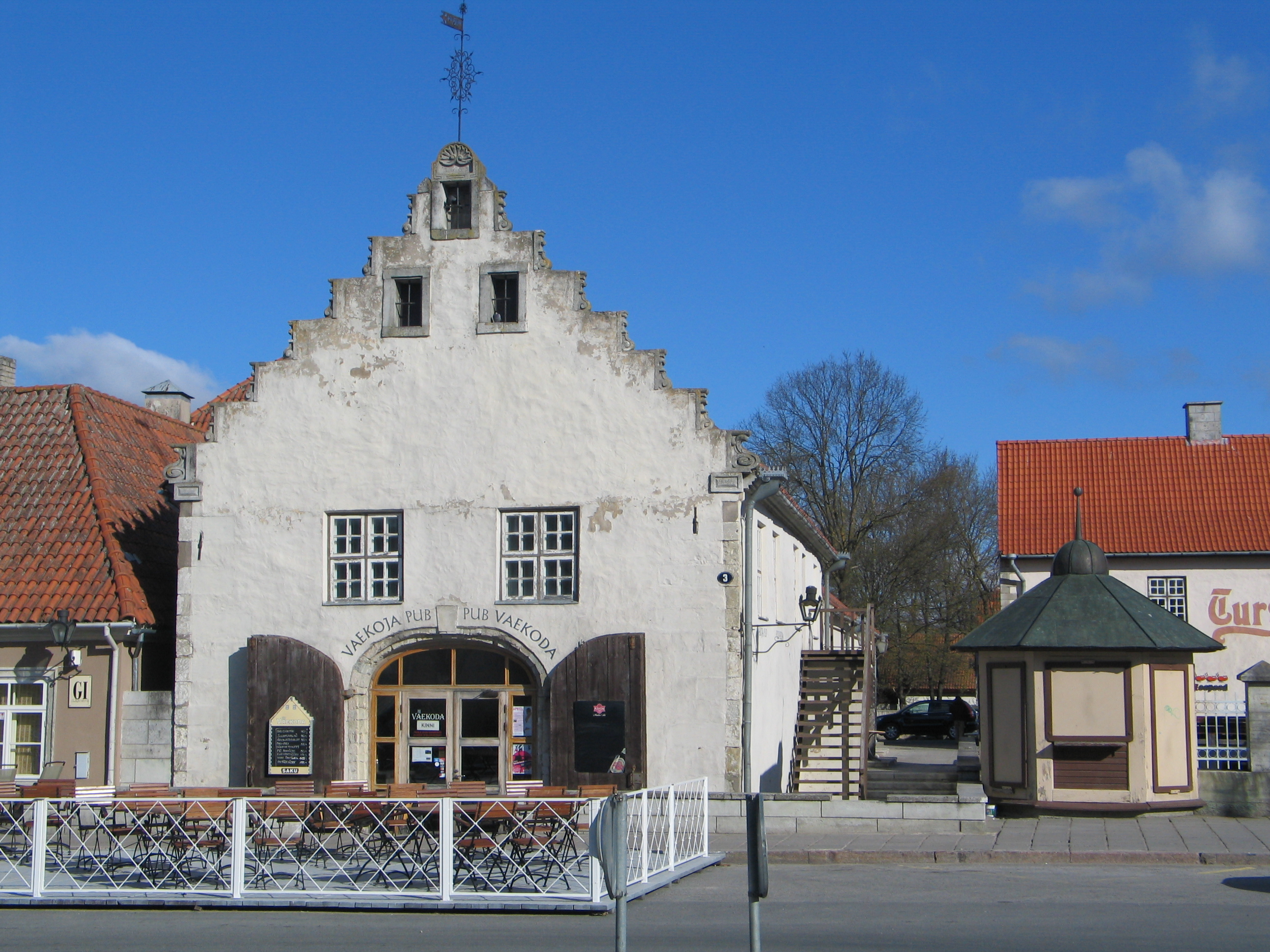 Vaekoja pub Kuressaare vaekoja hoones